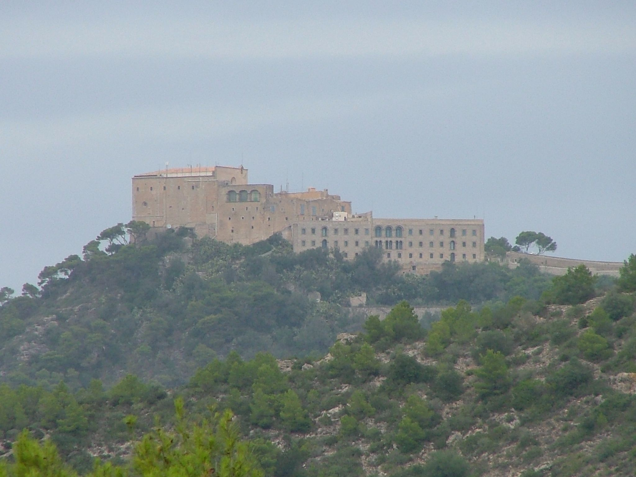 Santuari de Sant Salvador, Mallorca, Spain